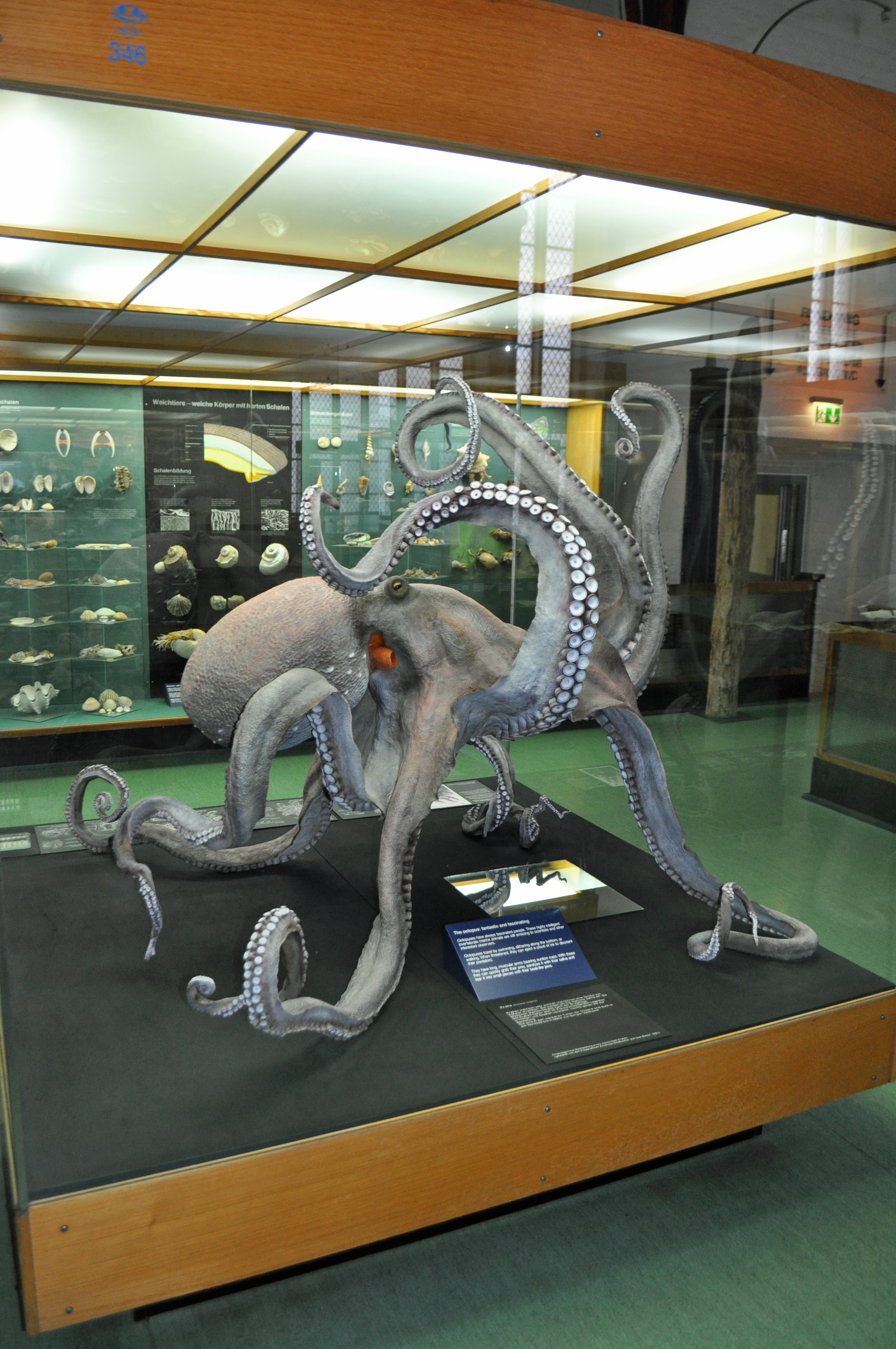 Stralsund, im Meeresmuseum (2013-02-13), by Klugschnacker in Wikipedia (49)